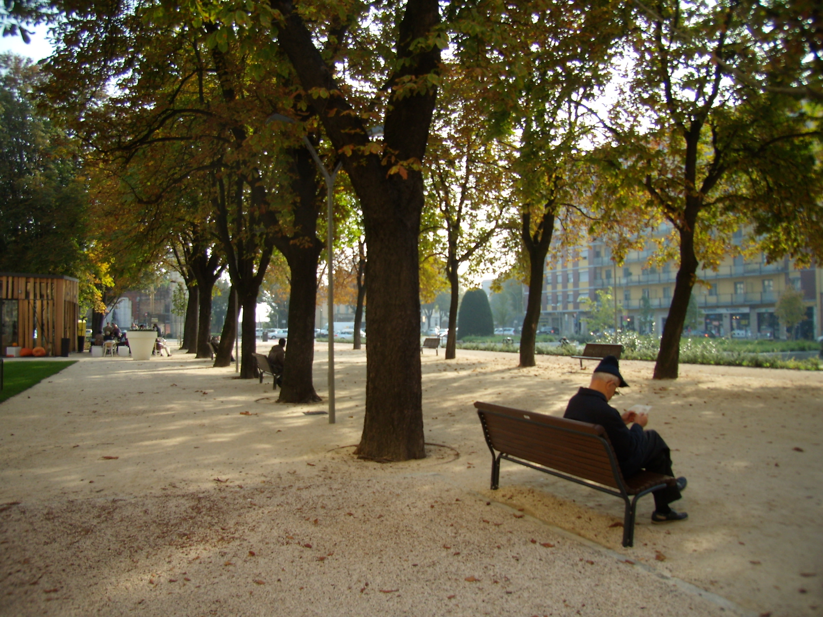 Vista dei giardini pubblici "Federico Barbarossa" di Lodi dal viale IV novembre